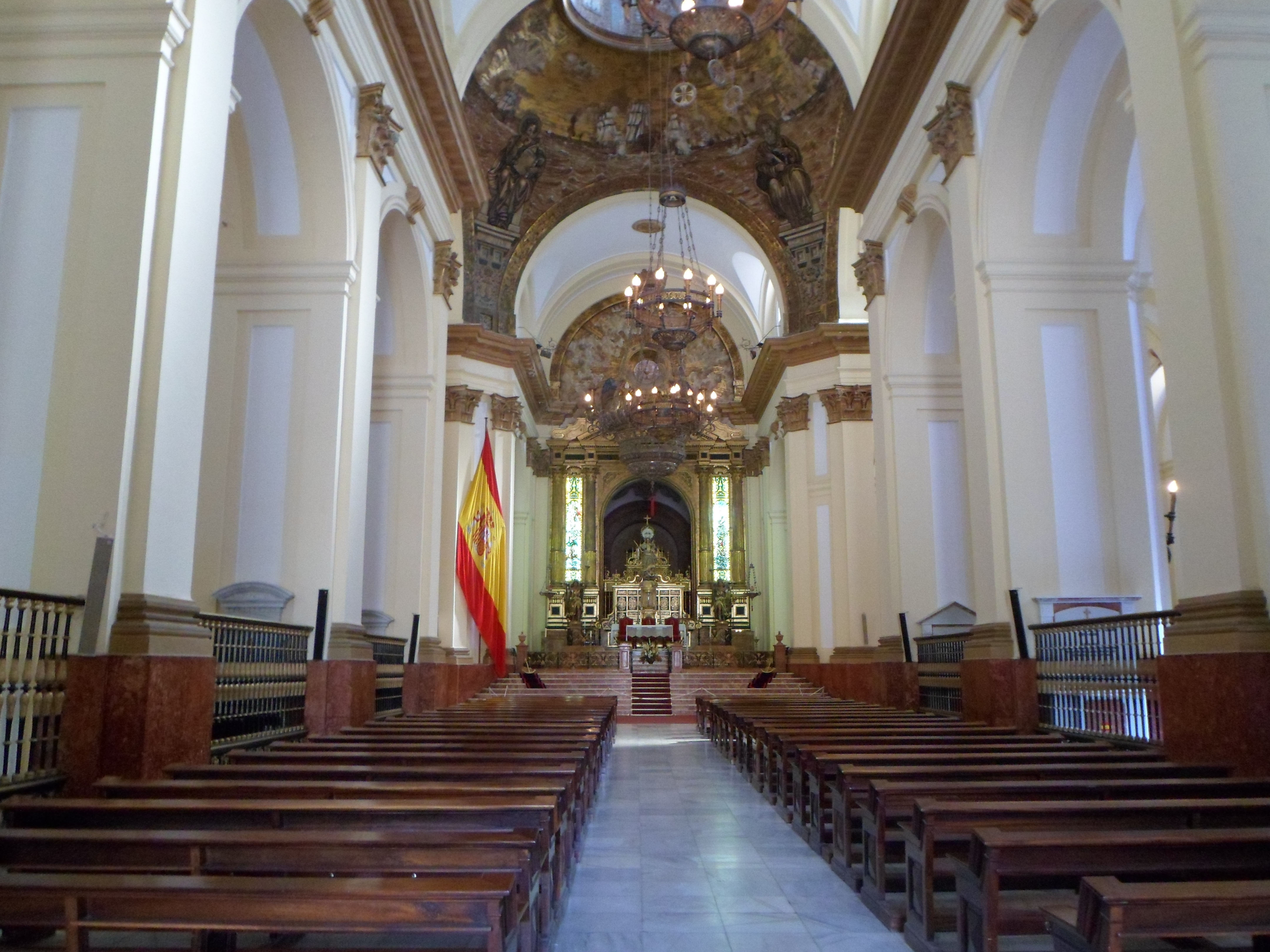 Panteón de marinos ilustres. San Fernando (Cádiz).